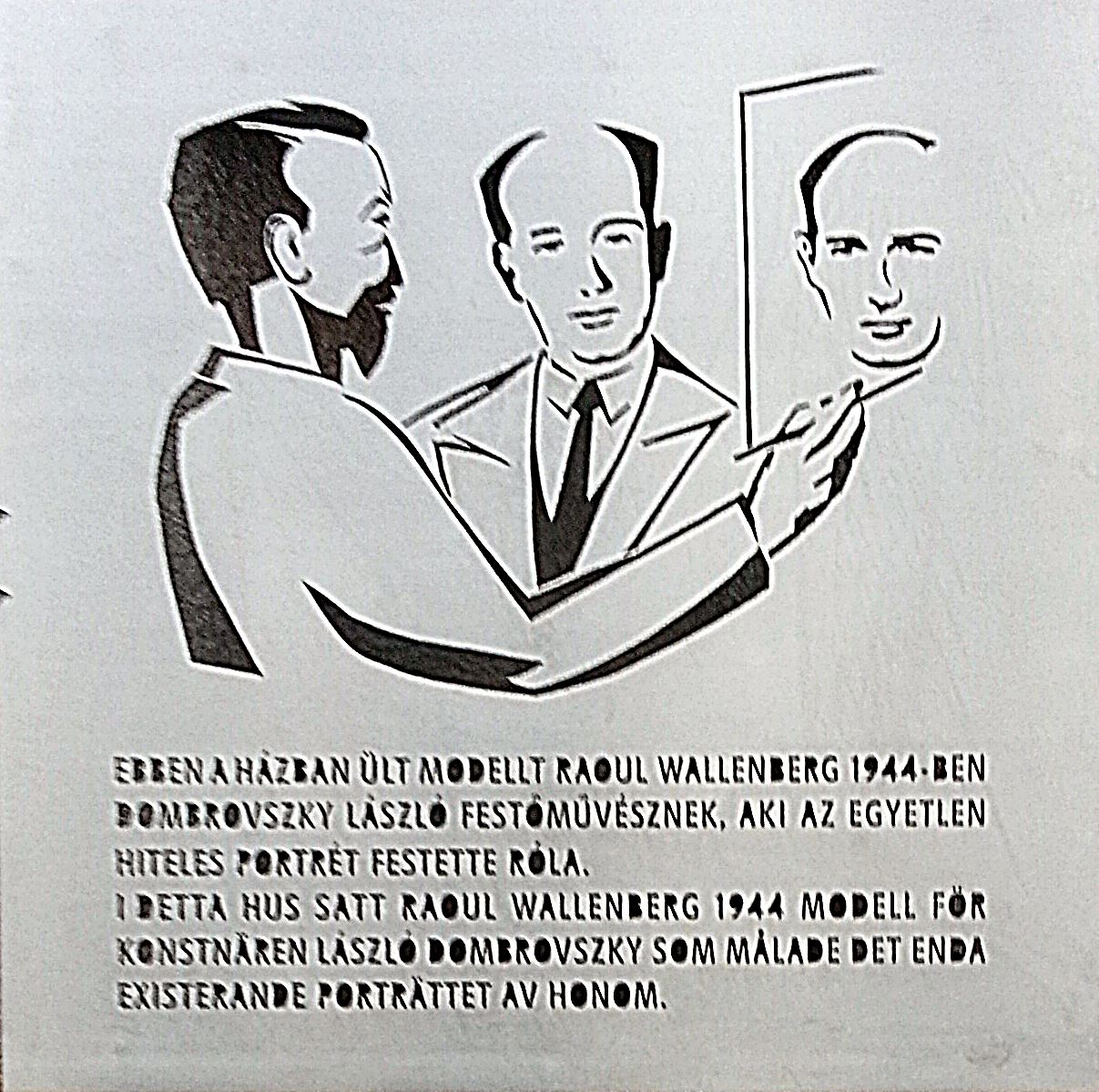 Raoul Wallenberg és Dombrovszky László emléktáblája Budapest II. kerületében (Keleti Károly utca 26.). Palotai Gábor alkotása.